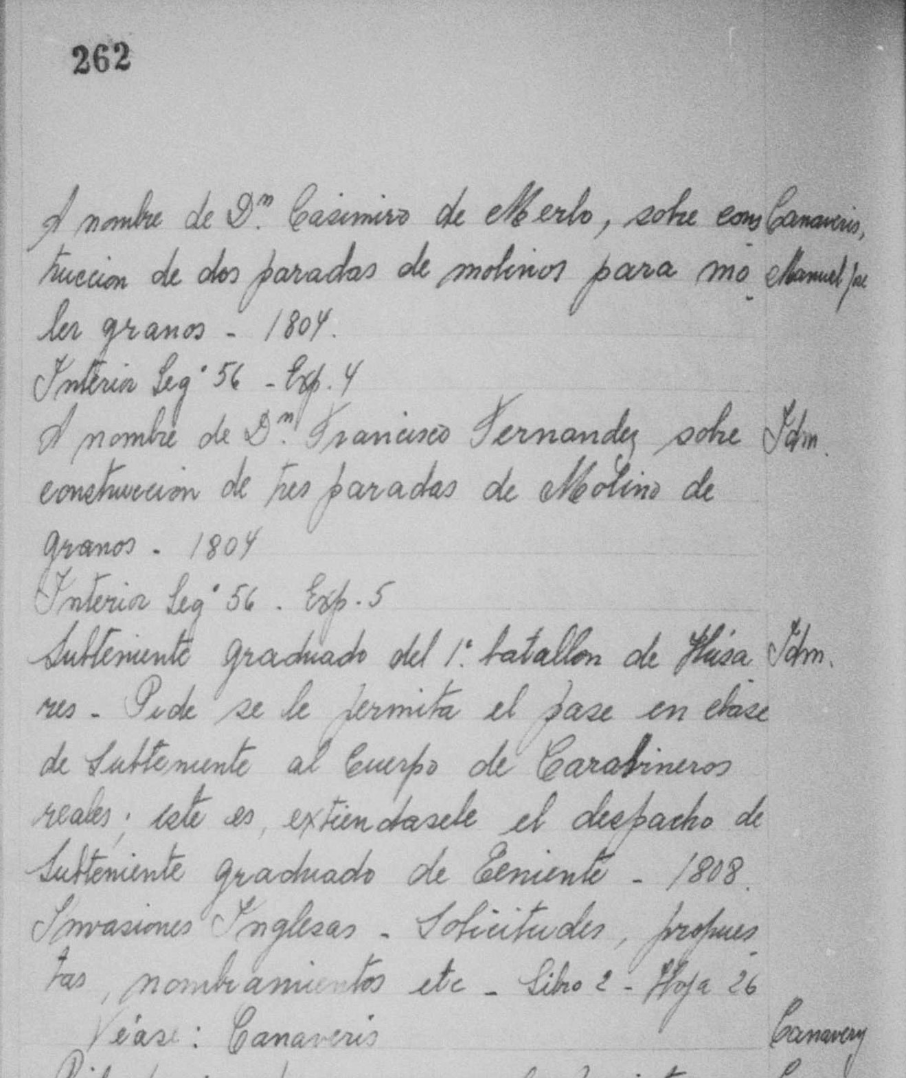 registro sobre las actuaciones de las familia Canaveris durante el Virreinato del Río de la Plata e Invasiones Inglesas.